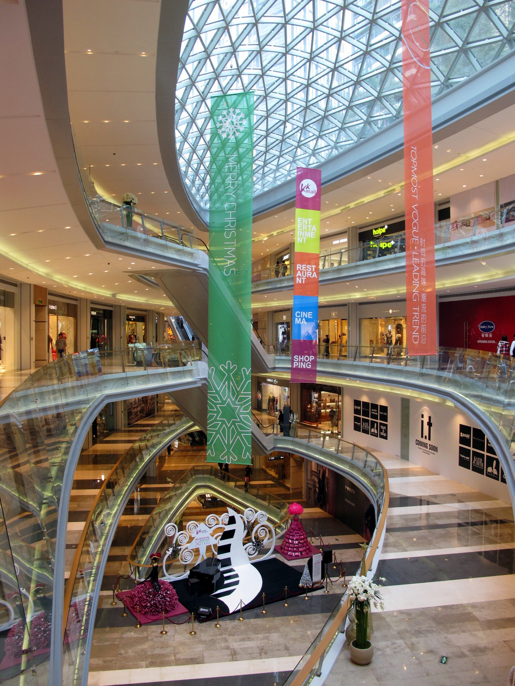 KK Mall Shenzhen Interior